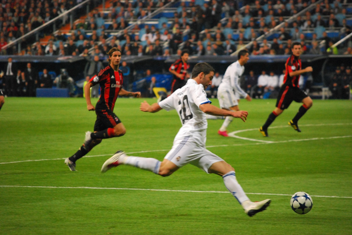 Chute de Gonzalo Higuain, en un encuentro del Real Madrid CF frente al AC Milan.